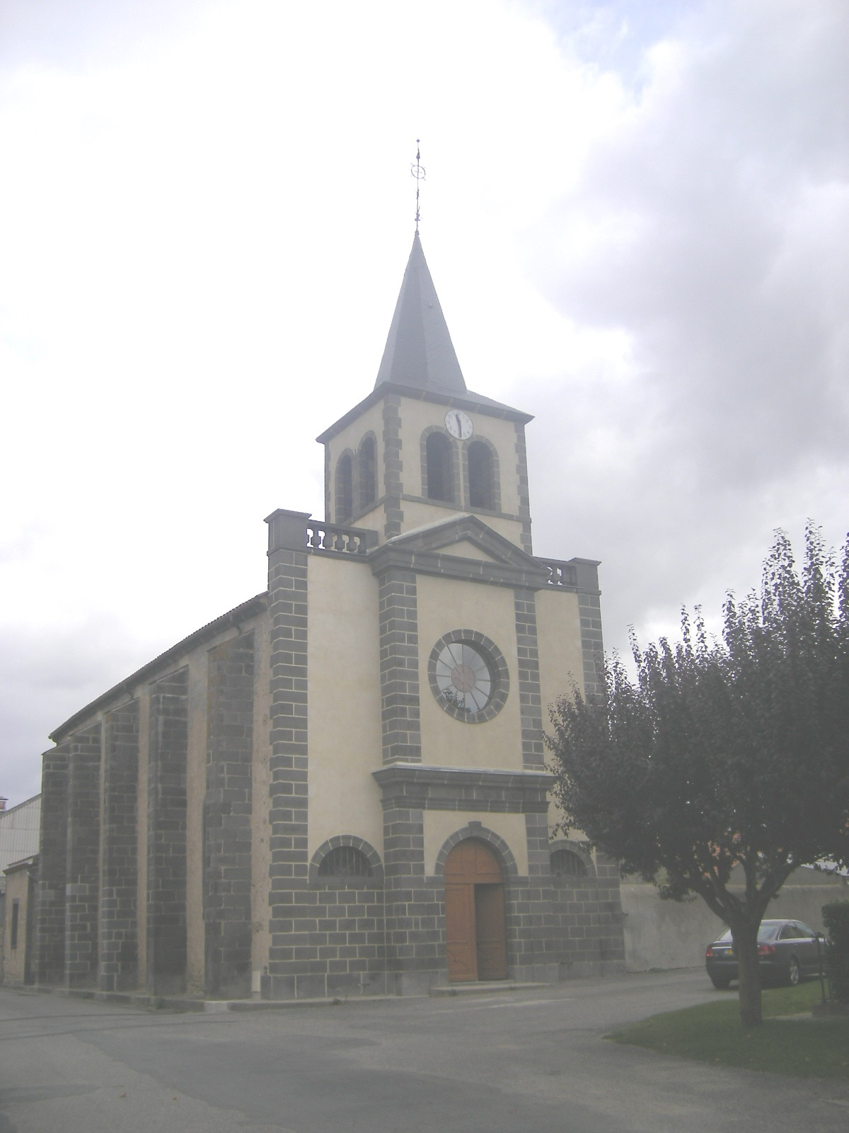 Sardon, Puy de Dôme, France